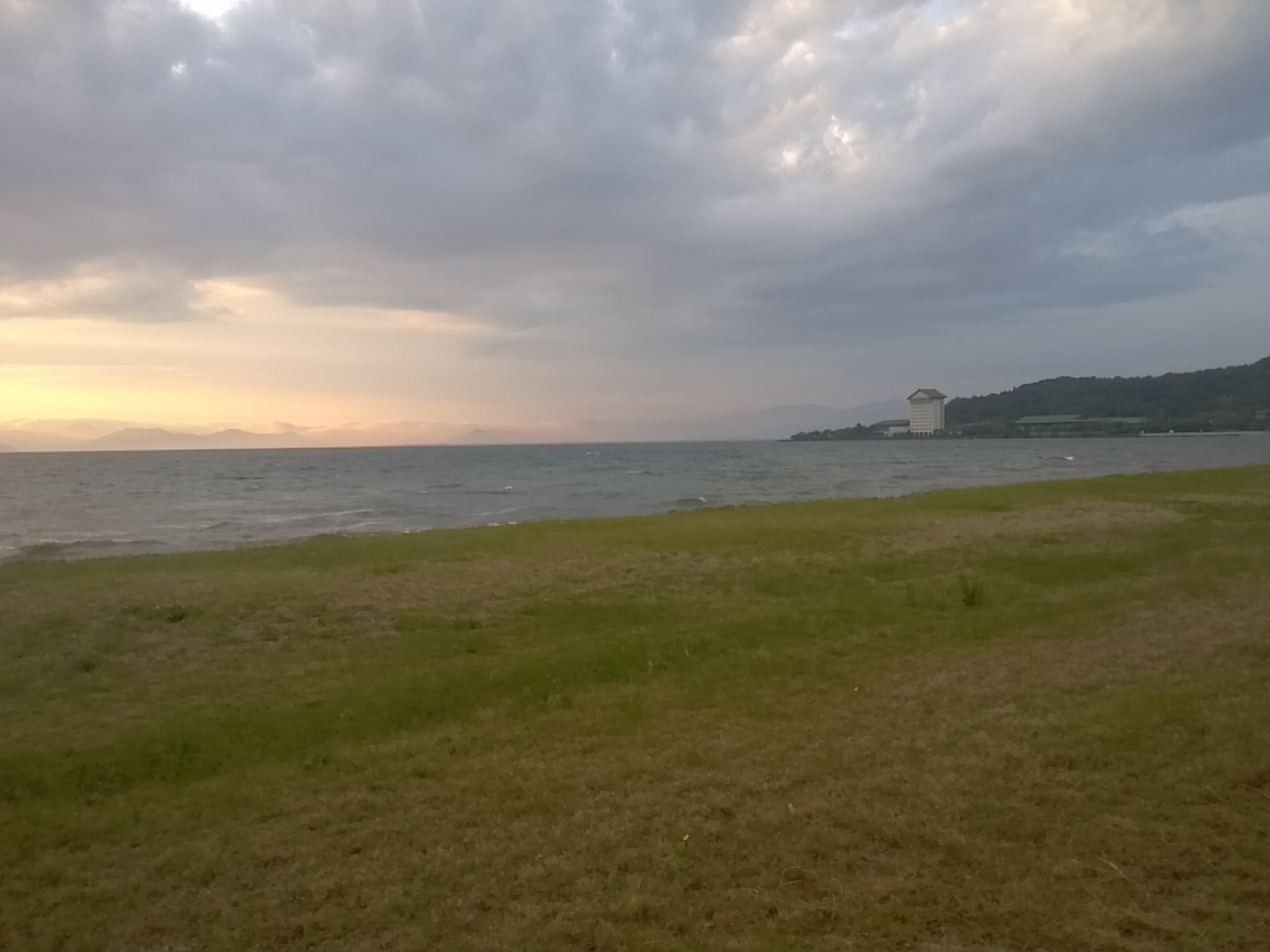 湖畔の水泳場 May 2014